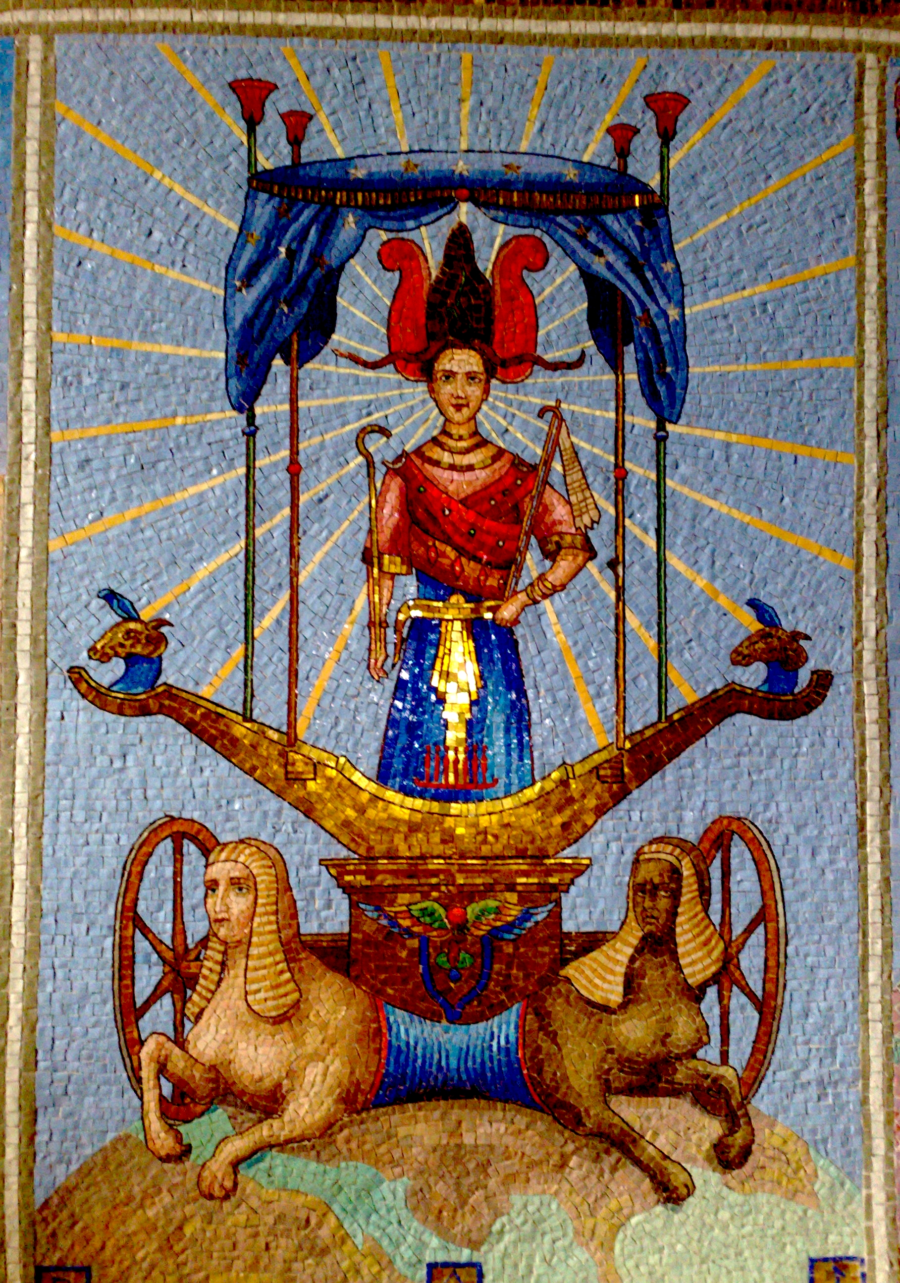 Mosaïque de la Chapelle du château des Avenières à Cruseilles en Haute-Savoie, France, représentant la carte du Chariot des Tarots divinatoires.